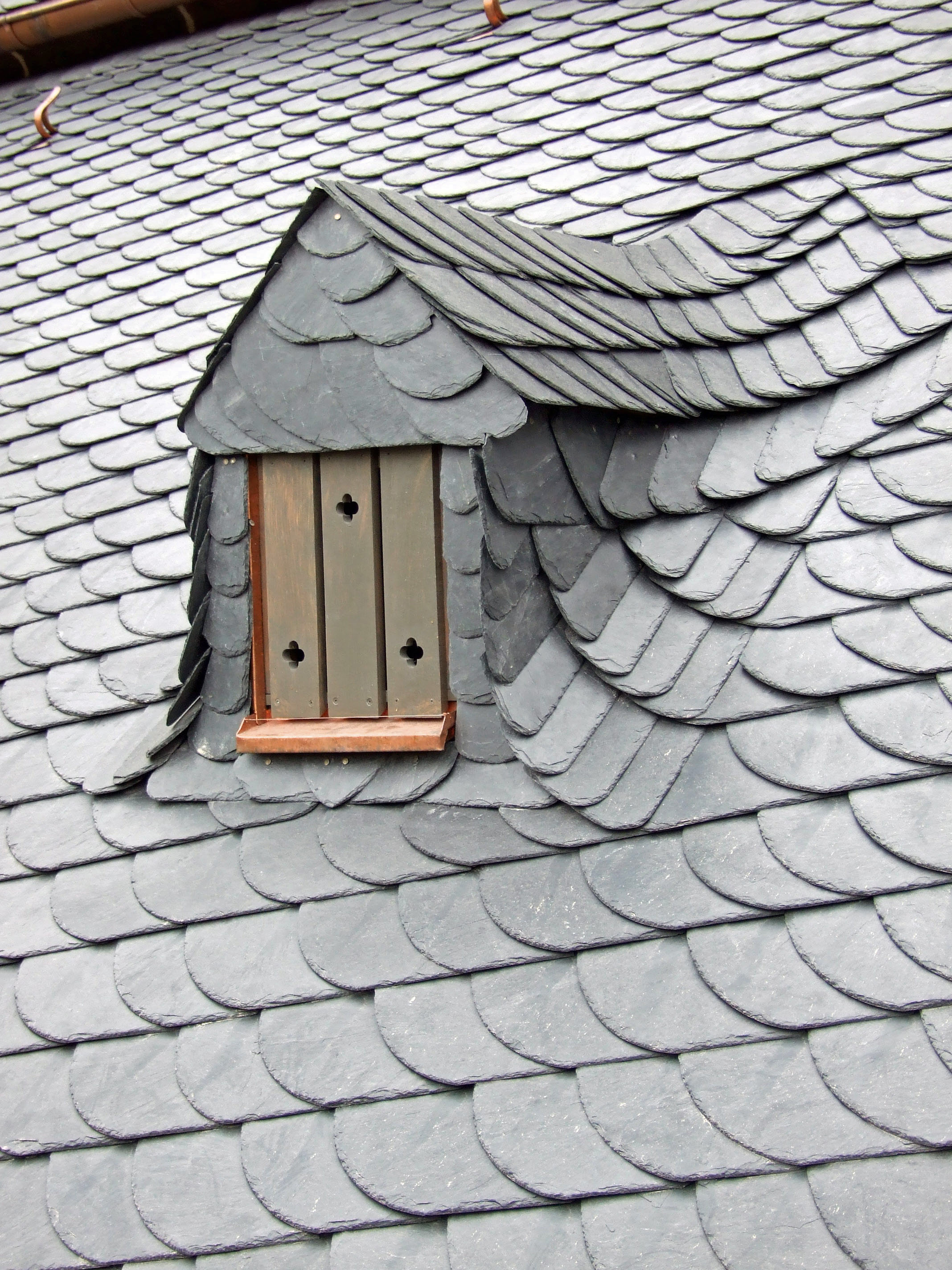 St. Leonhardskirche in Ffm, Detail der Renovierung 2007